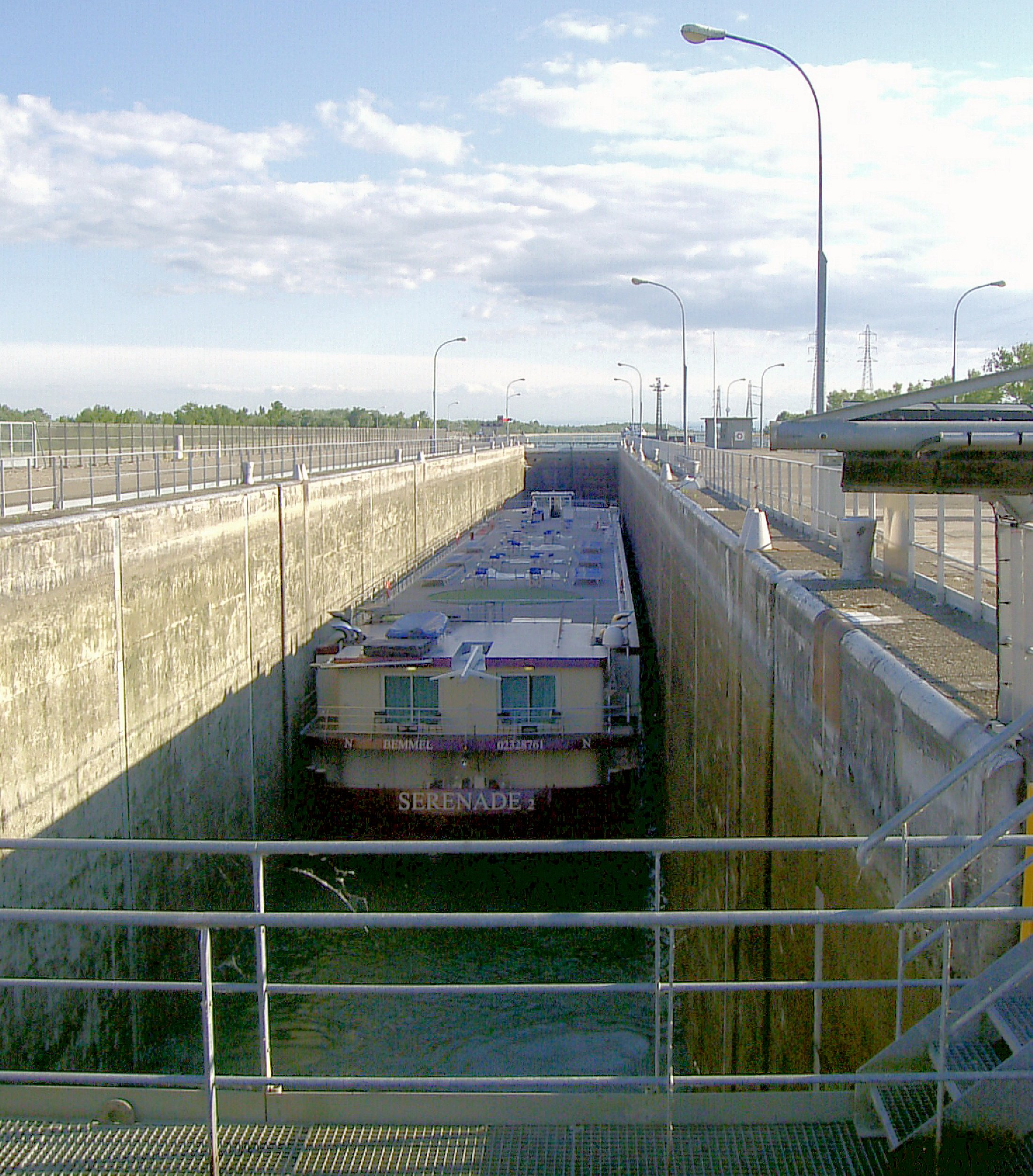 L'écluse à Fessenheim sur le Grand Canal d'Alsace